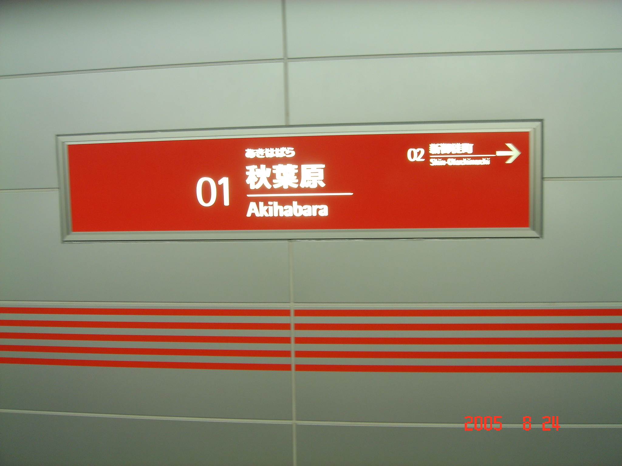 TX秋葉原駅の駅名標